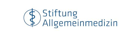 Logo der Stiftung Allgemeinmedizin